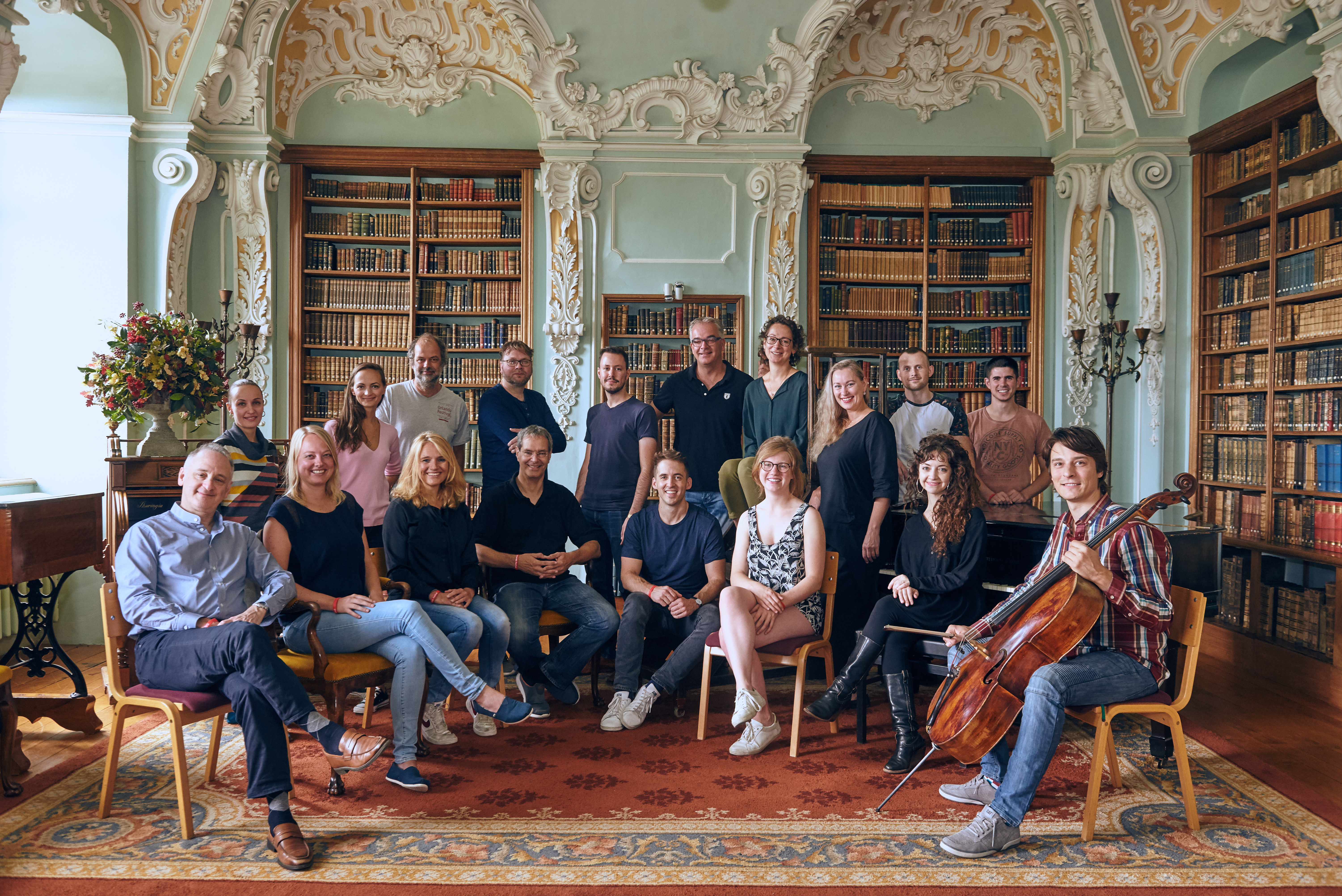 Gruppo Montebello op het Orlando Festival 2019 (Foto Sénen Fernández García)